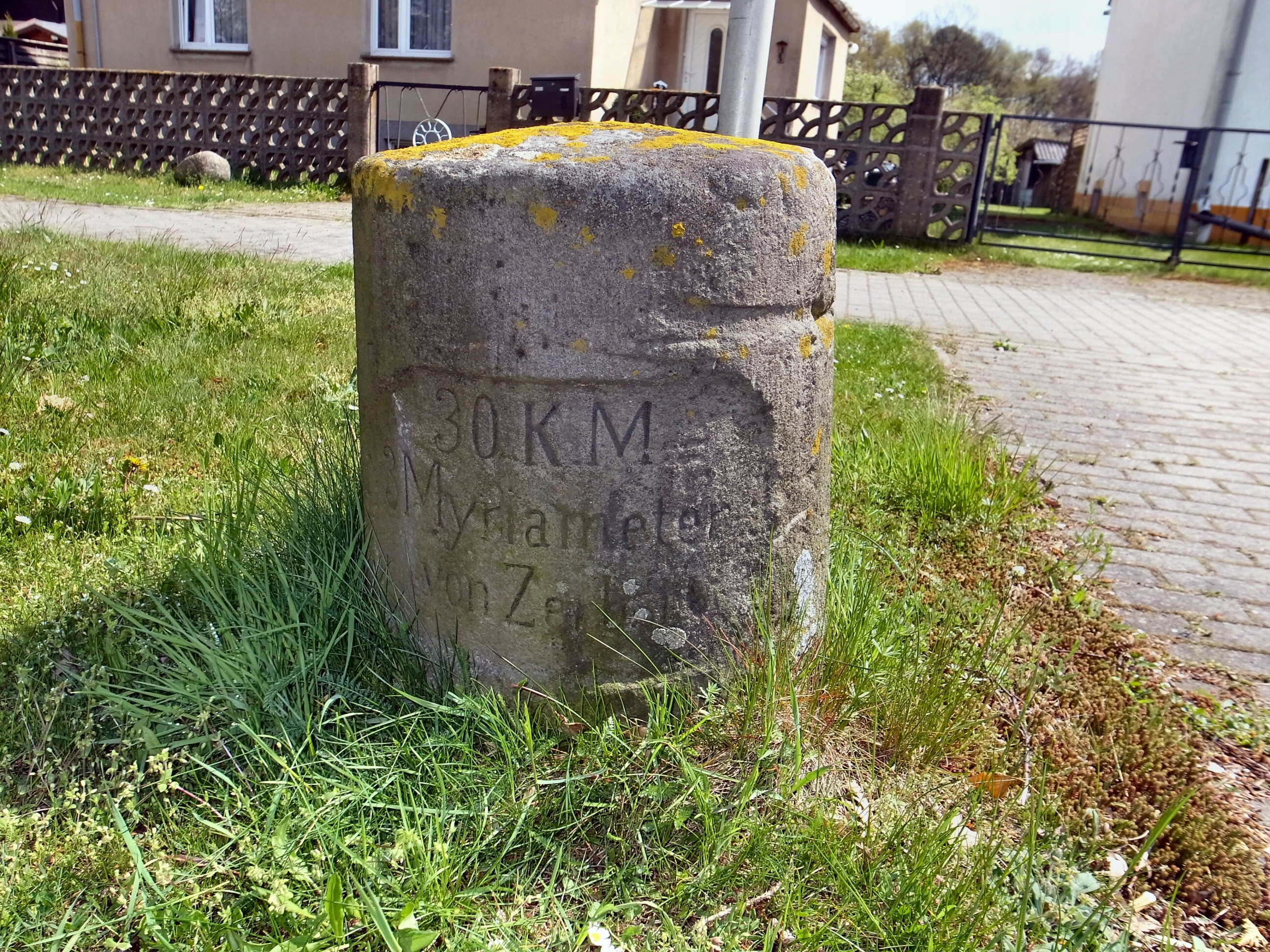 Jeber-Bergfrieden, Meilenstein, Myriameterstein. Innschrift: 30 K.M. 3 Myriameter von Zerbst